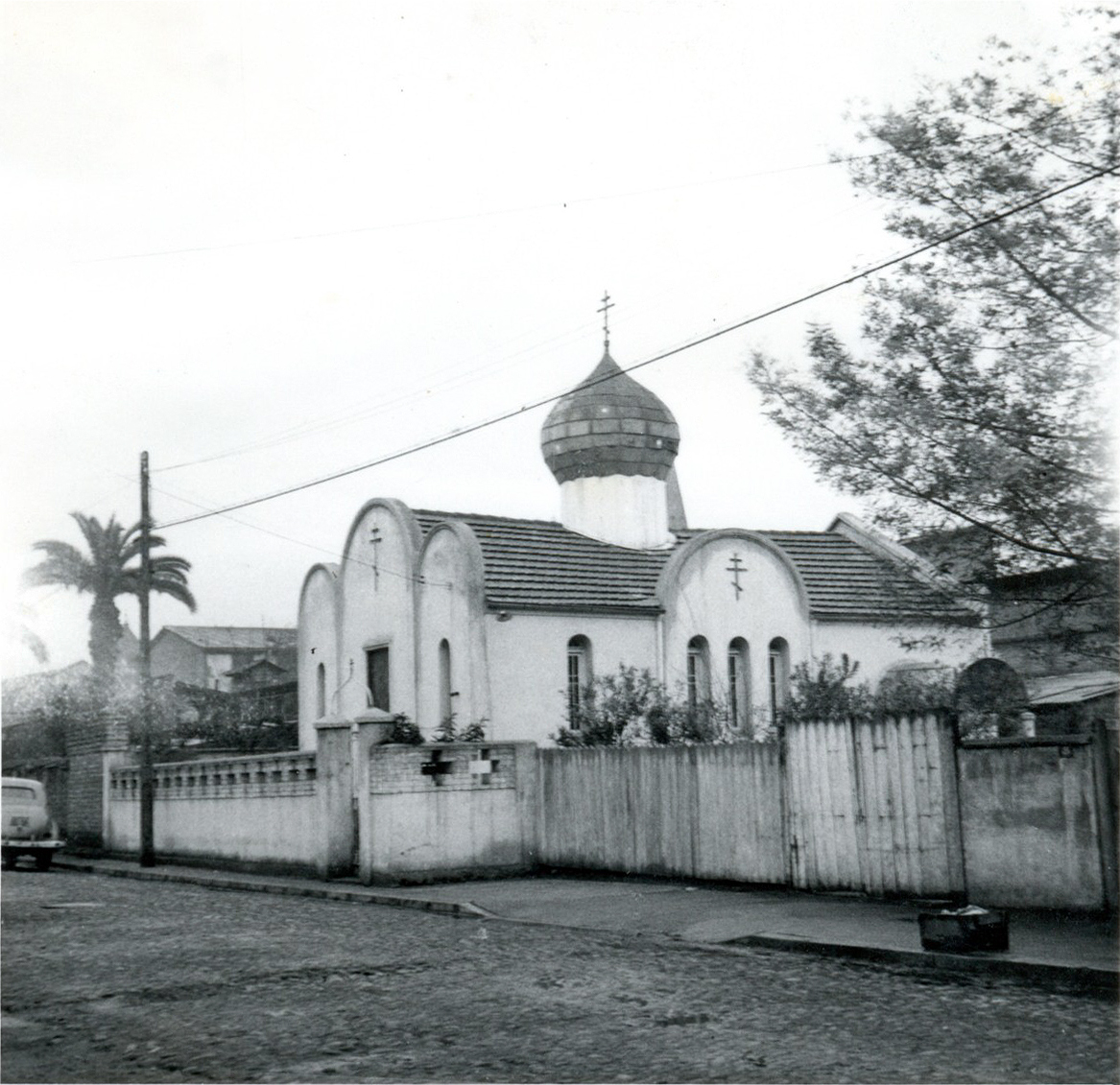 Iglesia de la Santísima Trinidad en Patronato 446 (vista sur-oriente). Los arcos laterales con cruces fueron removidos tras el terremoto de 1960.